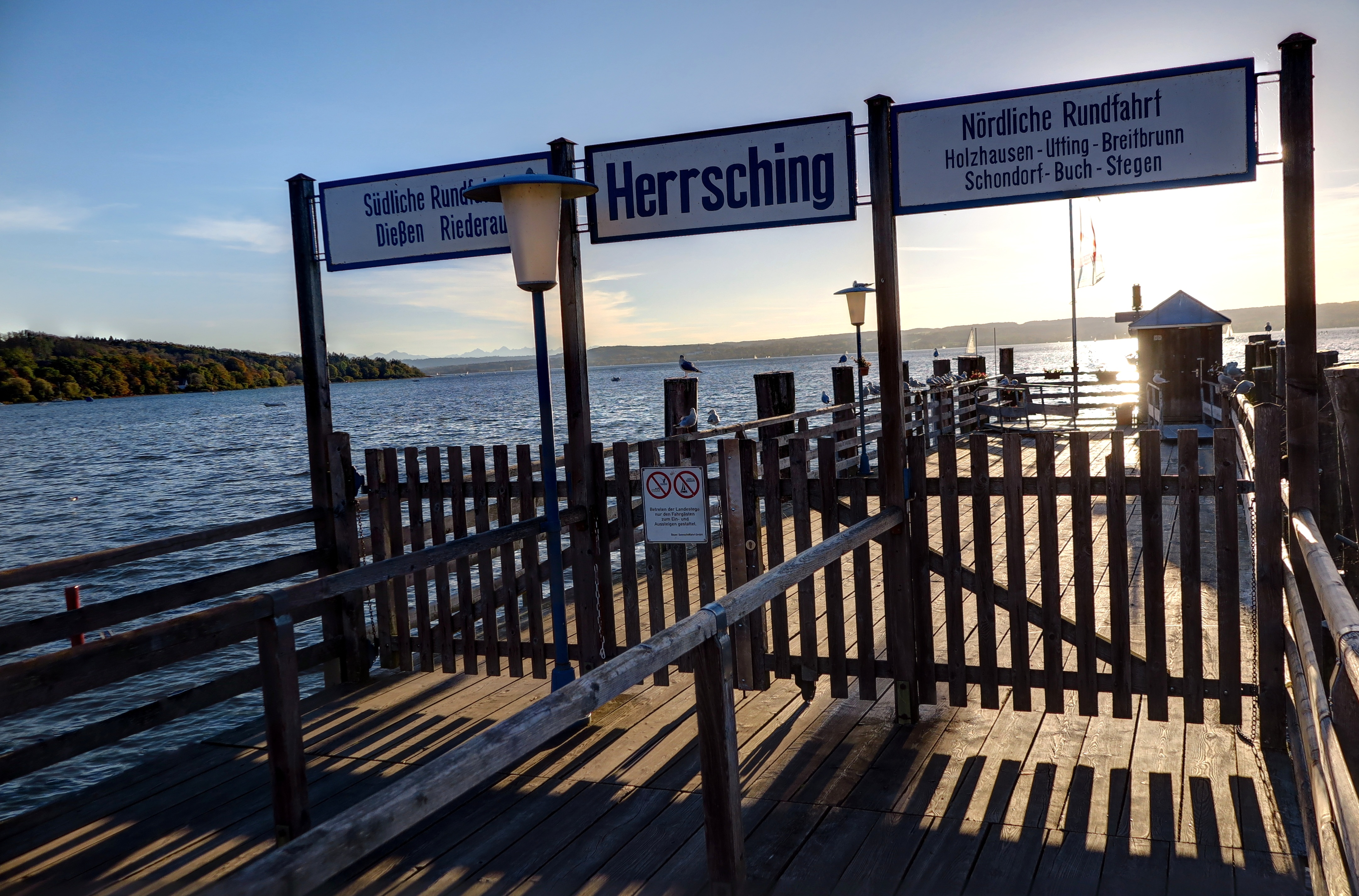 Deutschland, Bayern, Oberbayern, Landkreis Starnberg, Gemeinde Herrsching am Ammersee, Dampfersteg der Bayerischen Seenschifffahrt